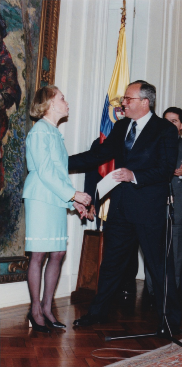 Olga Duque de Ospina junto a Ernesto Samper Pizano, expresidente de Colombia.